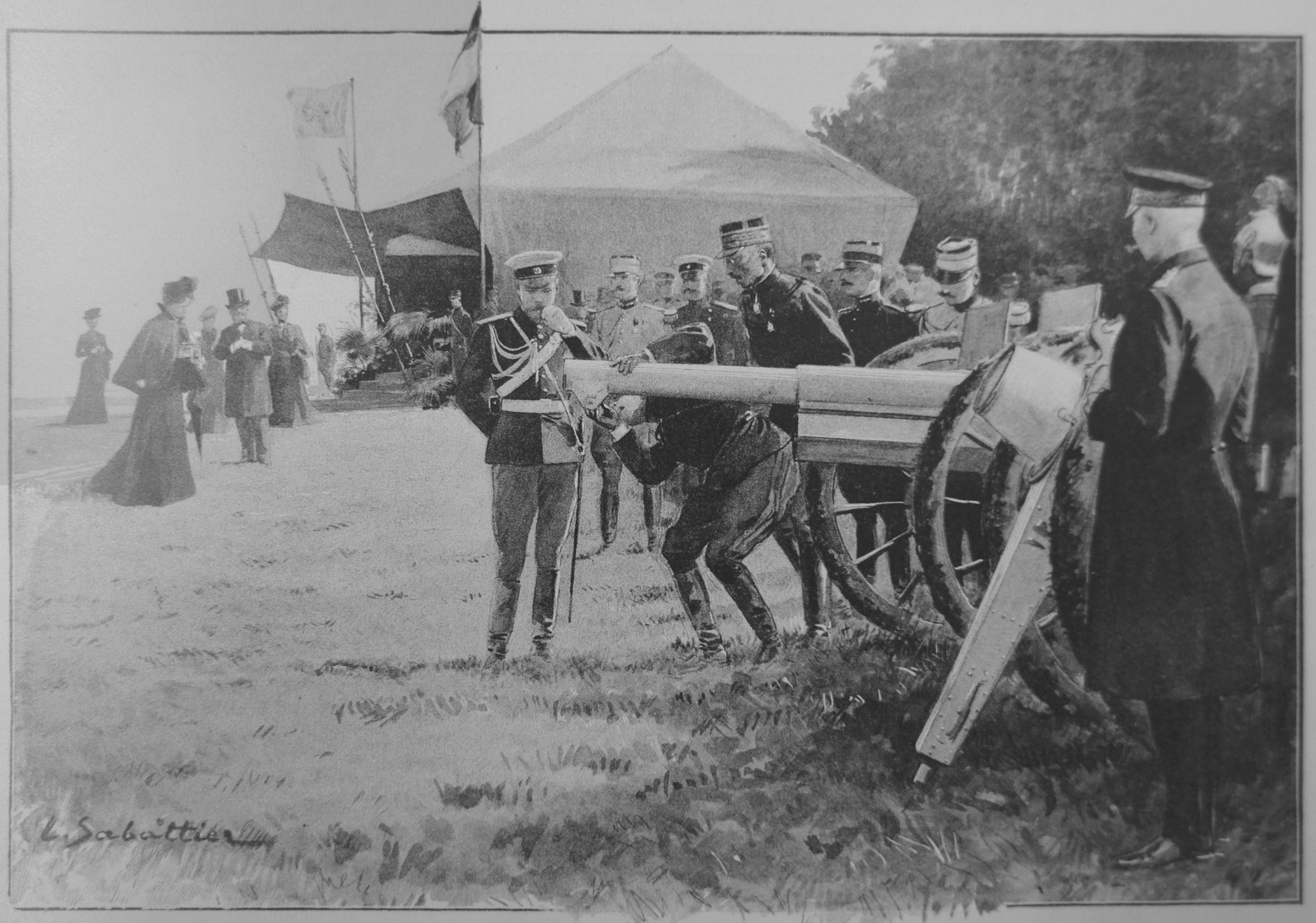 Le_tsar_se_fait_presenter_le_canon_de_75_lors des manoeuvres de 1901 .